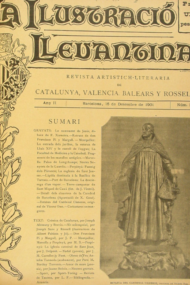 segon tipus de portada